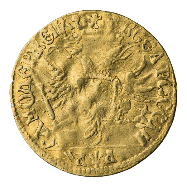 Червонец Петра I 1701 г. Реверс. Двуглавый орёл, увенчанный тремя коронами, в лапах скипетр и держава, на груди щит с гербом Москвы. Внизу, под чертой, дата кириллицей: ҂АѰА. Круговая надпись: ВСЕА РѠССІИ САМОДЕРЖЕЦЪ